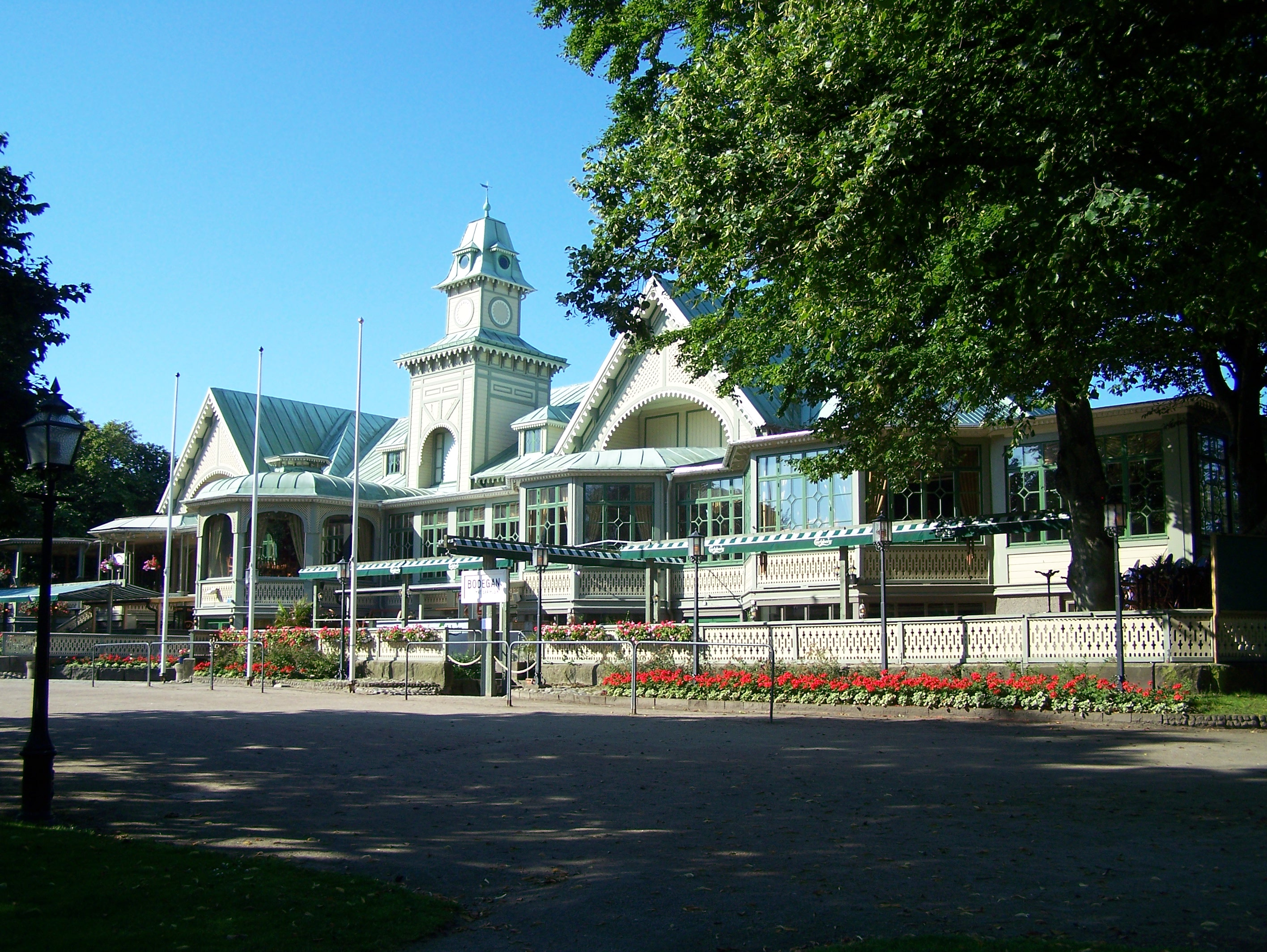 Societetshuset, Varberg, Sverige.